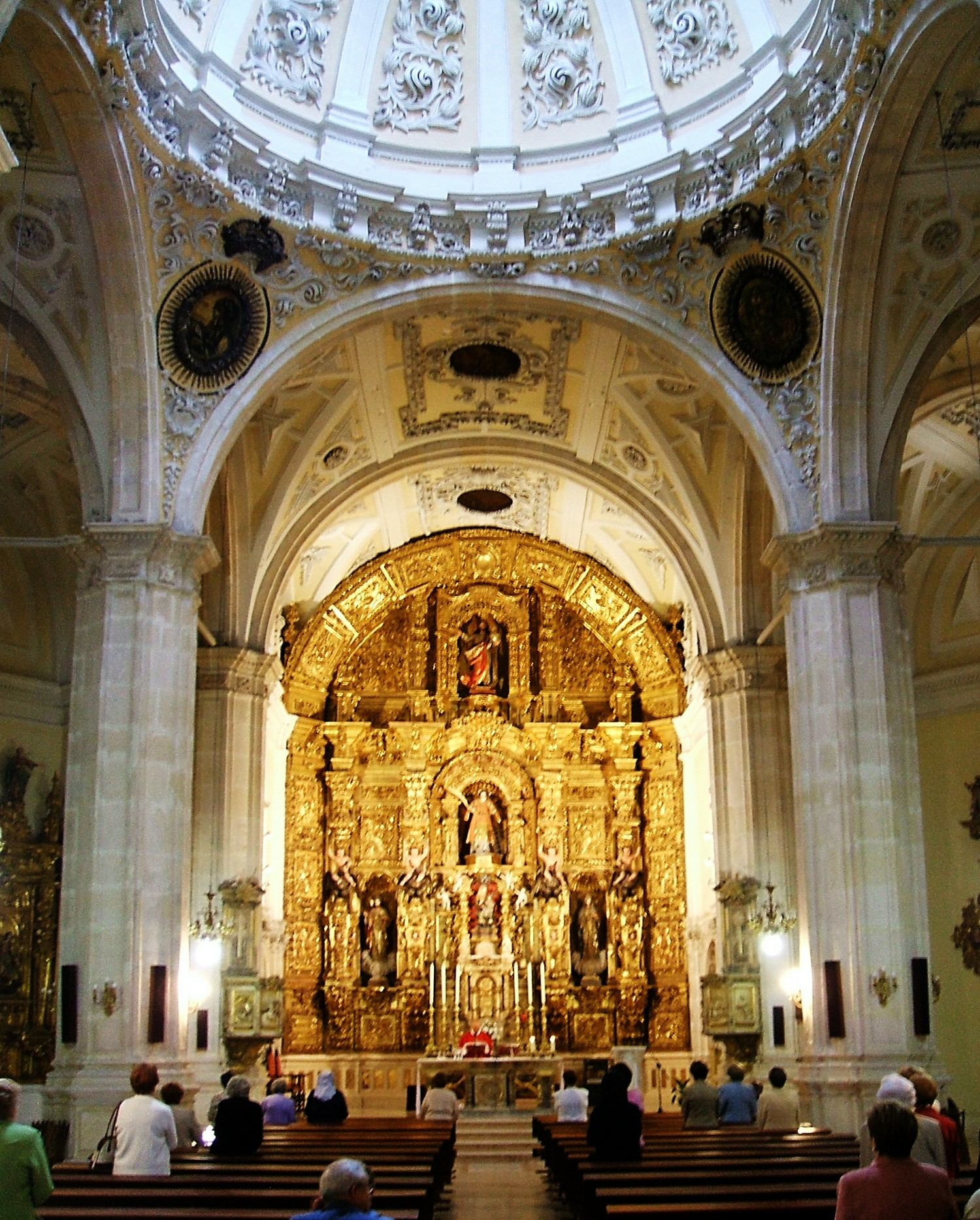 Cabecera barroca de la Iglesia de San Lorenzo (s-XVII), Burgos, Castilla y León, España/Spain